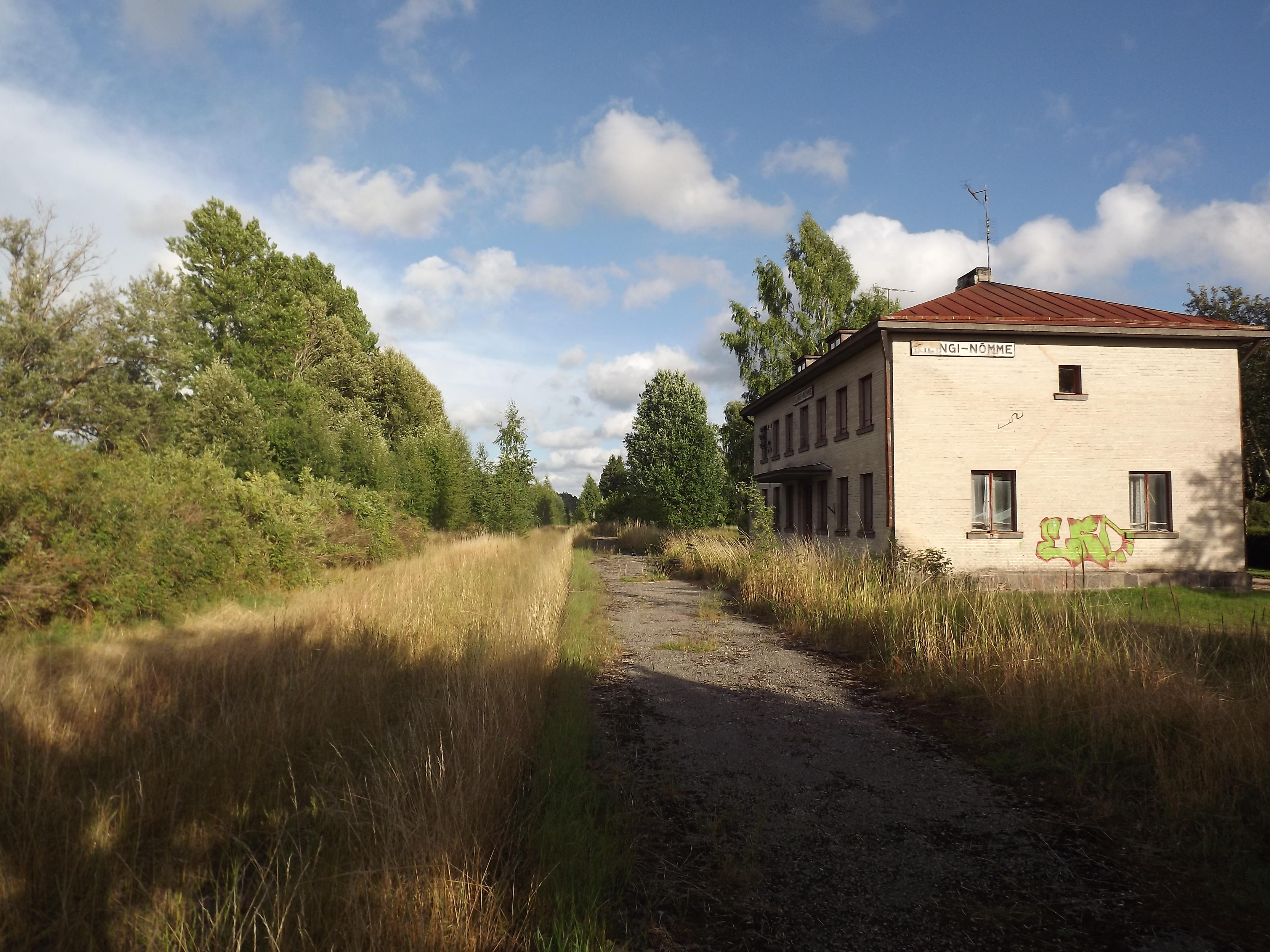 Kilingi-Nõmme raudteejaam